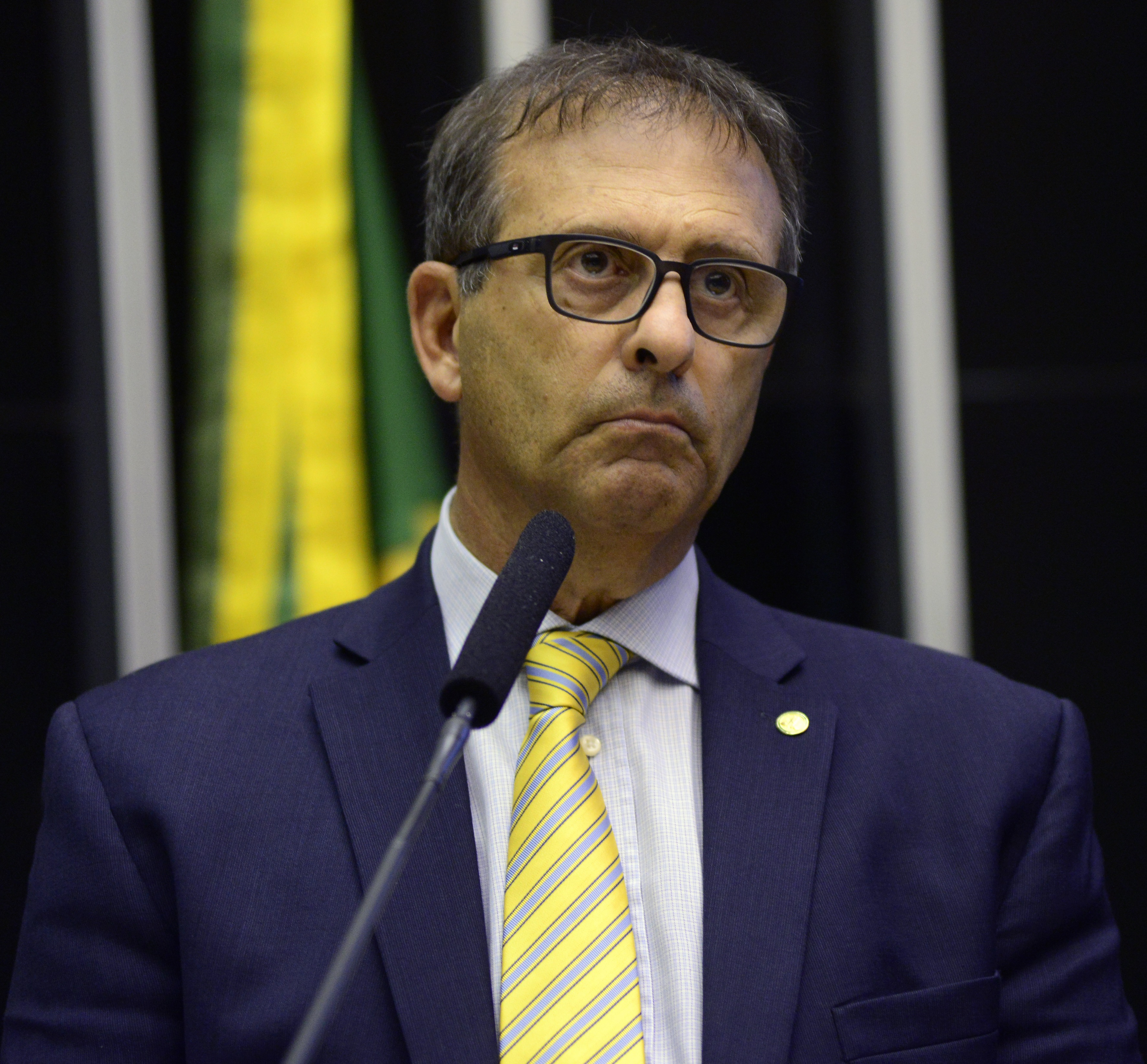 Jorge Tadeu em setembro de 2015.